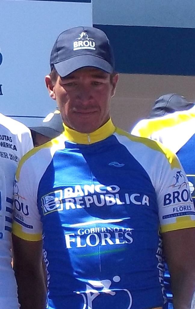 Ciclista Uruguayo Luis Alberto Martínez